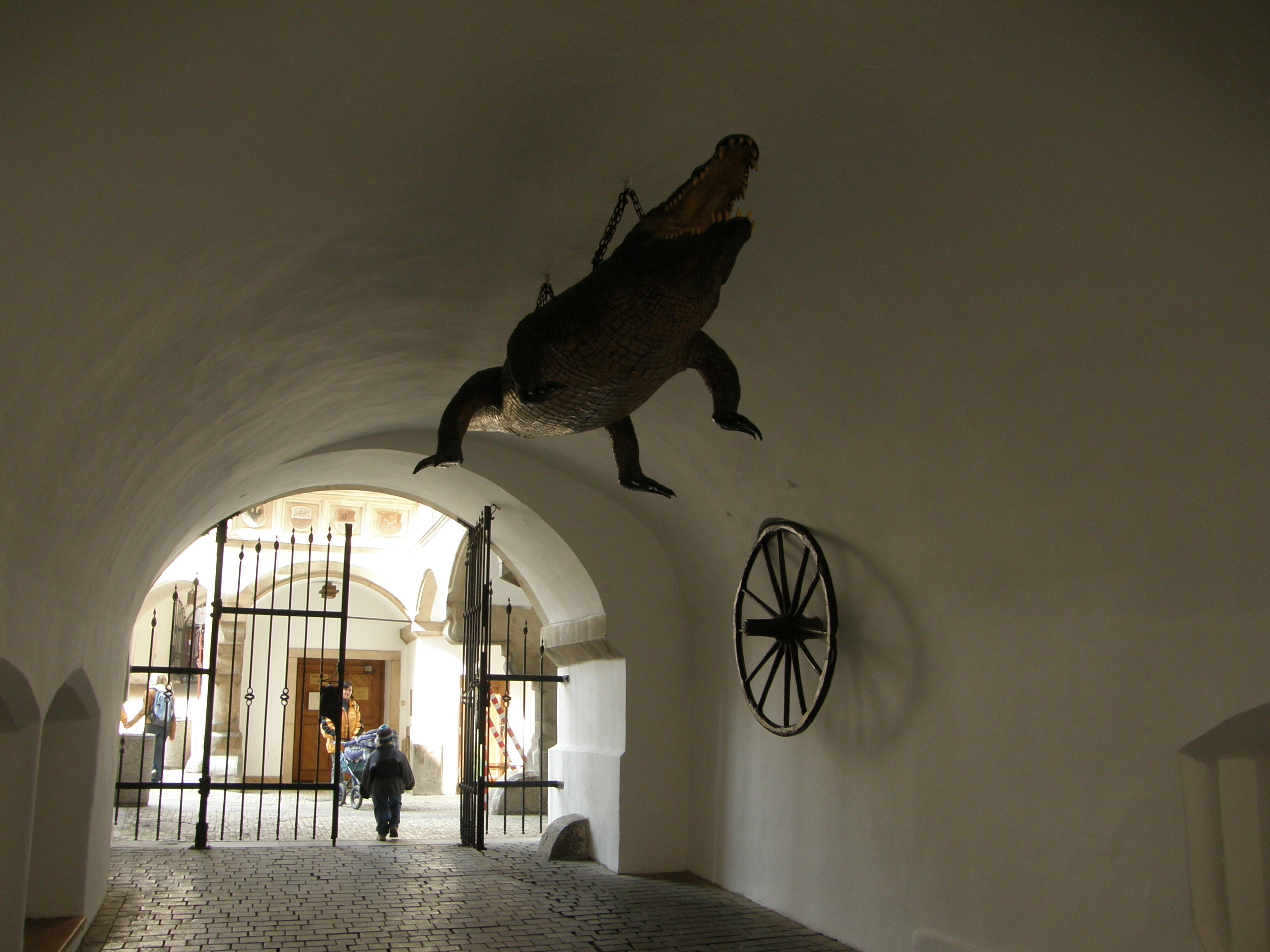 Stará radnice (Brno)